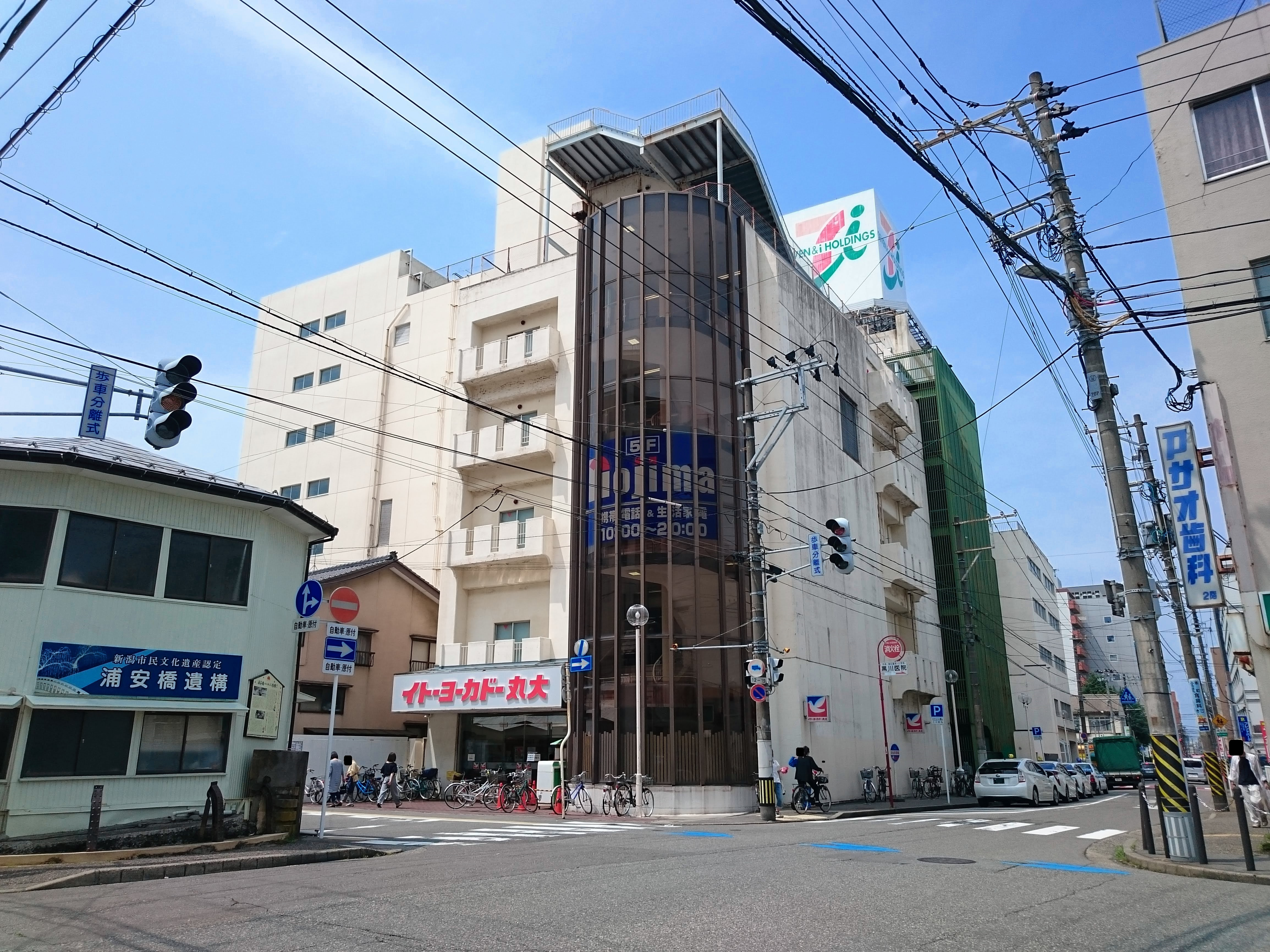 イトーヨーカドー丸大新潟店の外観（行灯撤去、ノジマ入居後）